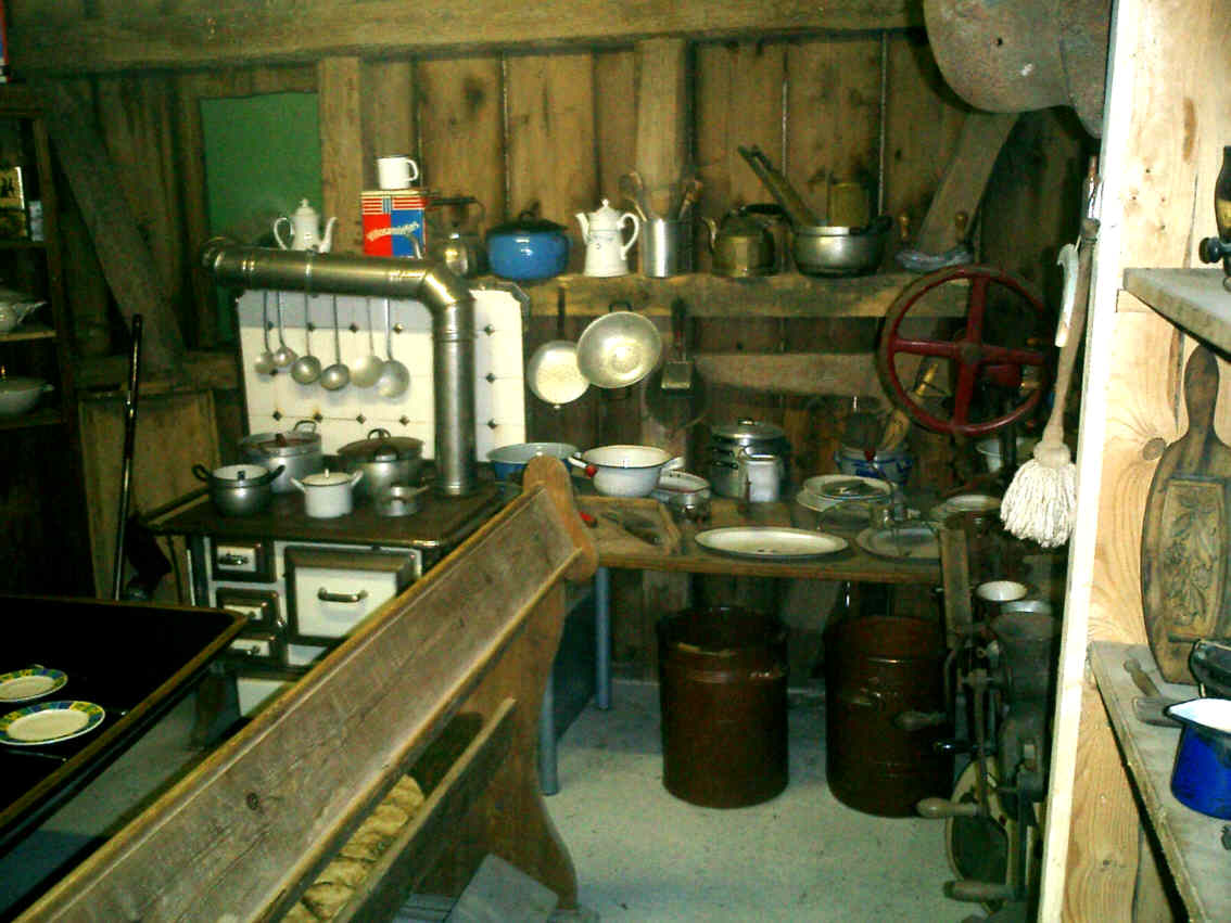 Bauernmuseum Wiehl in Monsau/Wiehl Fotografiert: am 8.04.2005